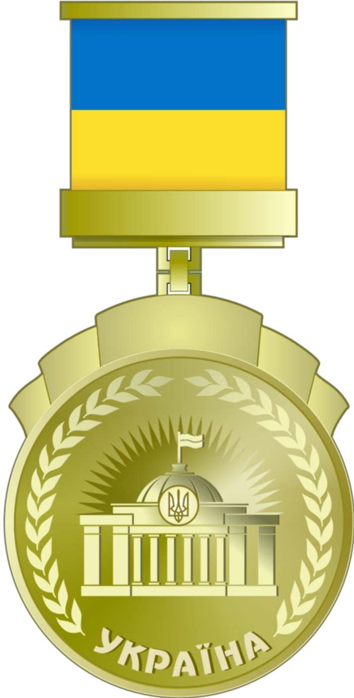 Нагрудний Знак до Почесної Грамоти Верховної Ради України